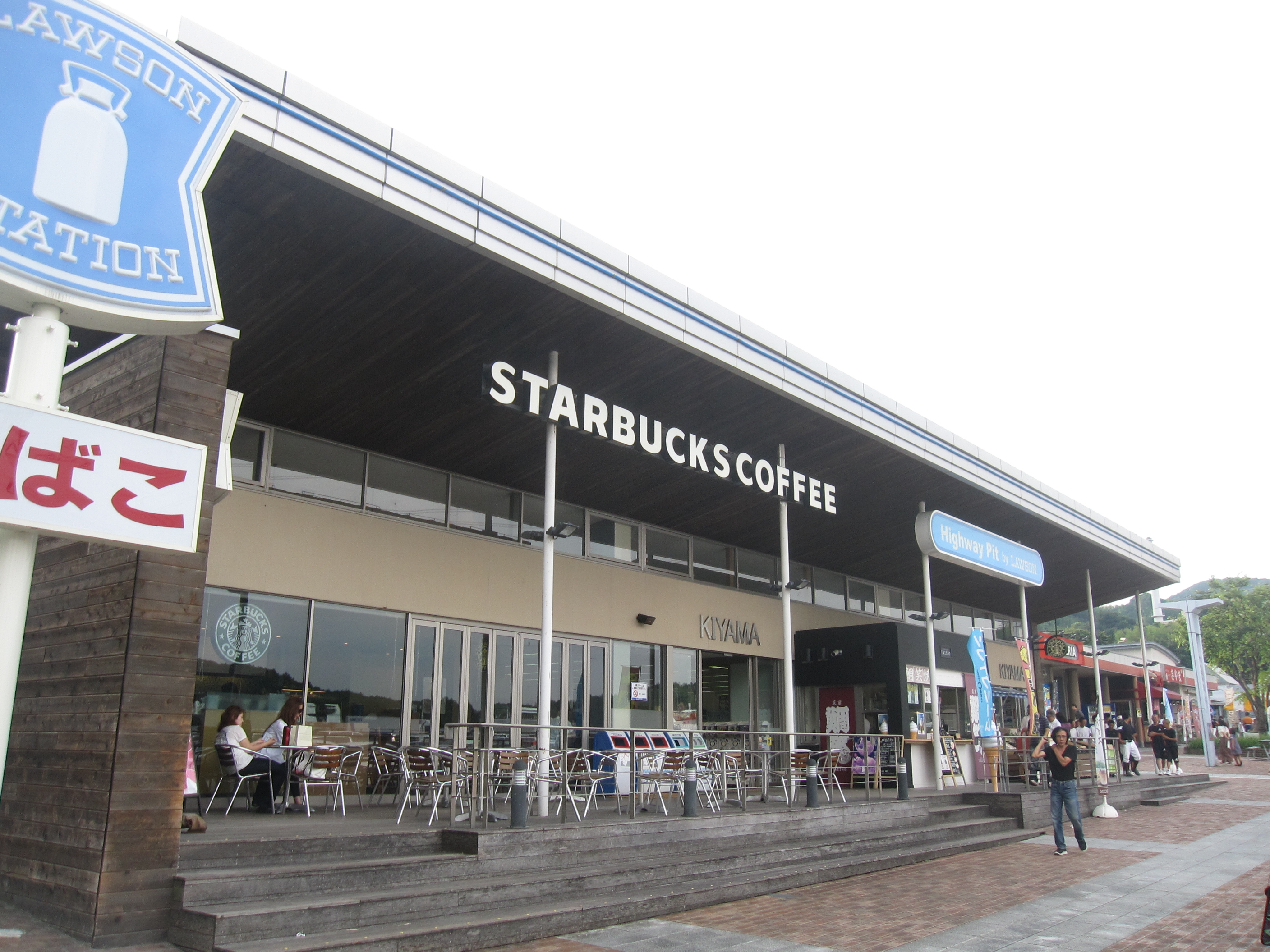 基山PA スターバックス